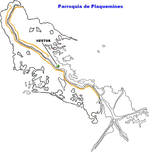 Nestor, Louisiana.